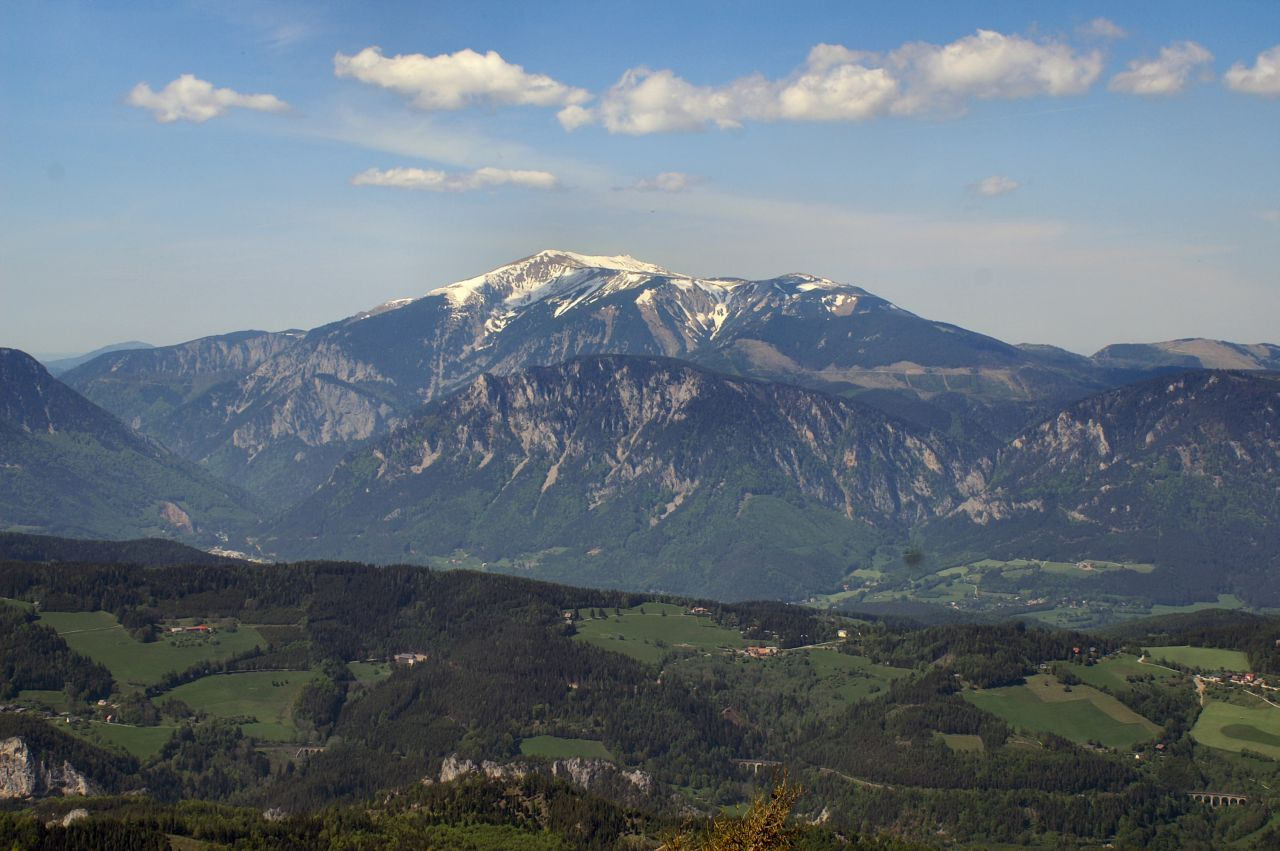 Beschreibung: Blick auf den Schneeberg vom Sonnwendstein (1523m) Quelle: selbst fotografiert Fotograf oder Zeichner: Michael Schletz